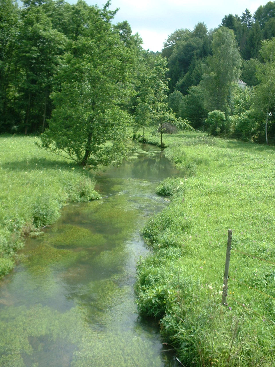 Aufseß River near Forchheim (Franconia)